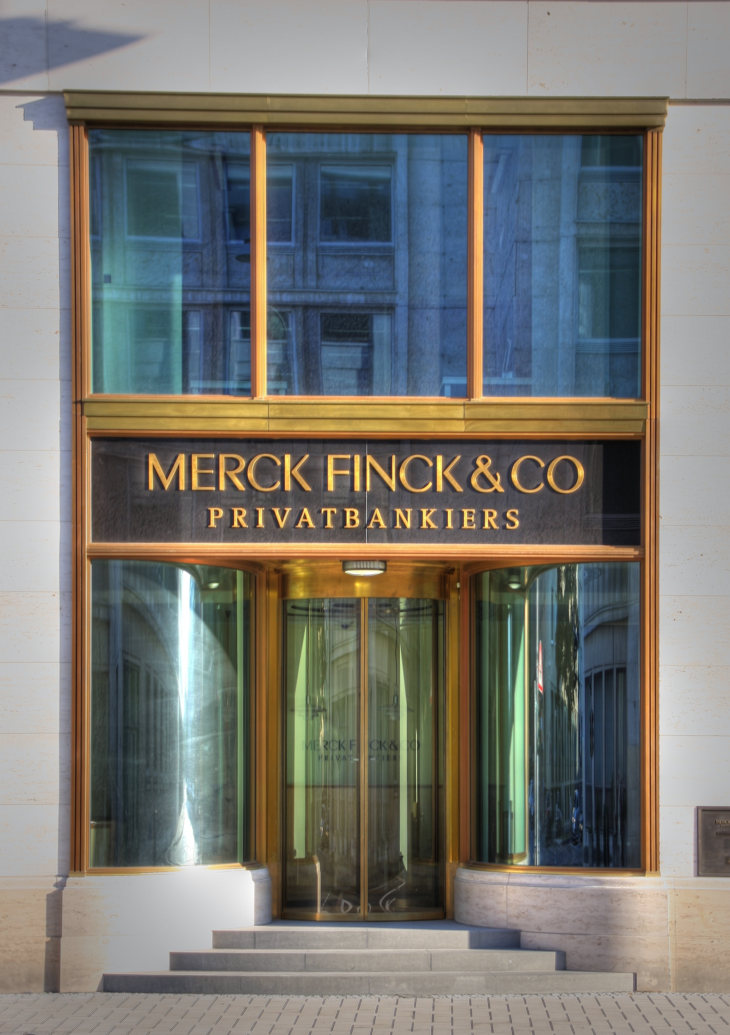 Eingang zur Kölner Filiale der Bank Merck Finck & Co. in einem 2009 erbauten Gebäudekomplex. Adresse: Unter Sachsenhausen 17, Köln